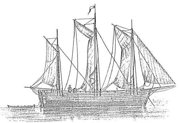 Парусный лихтер